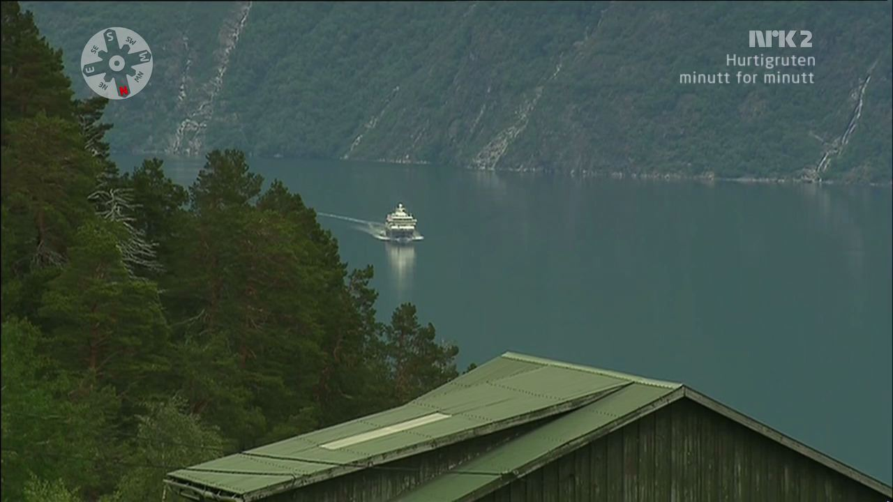 Hurtigruten in Geirangerfjorden, Norway. Bildet er grabbet fra videofeed